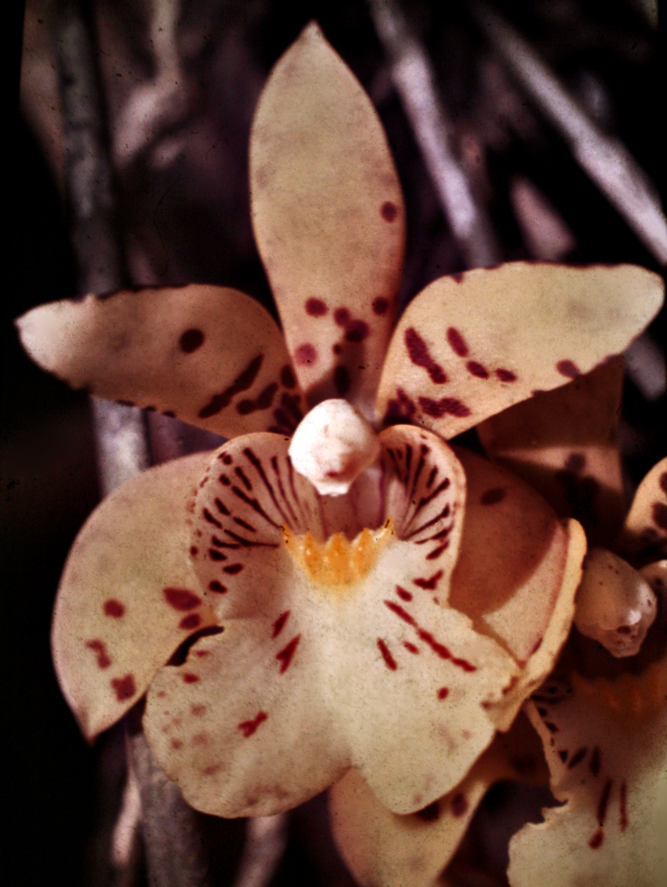 Scuticaria steelei, Suriname. - Road to plantation Victoria, near Suriname river